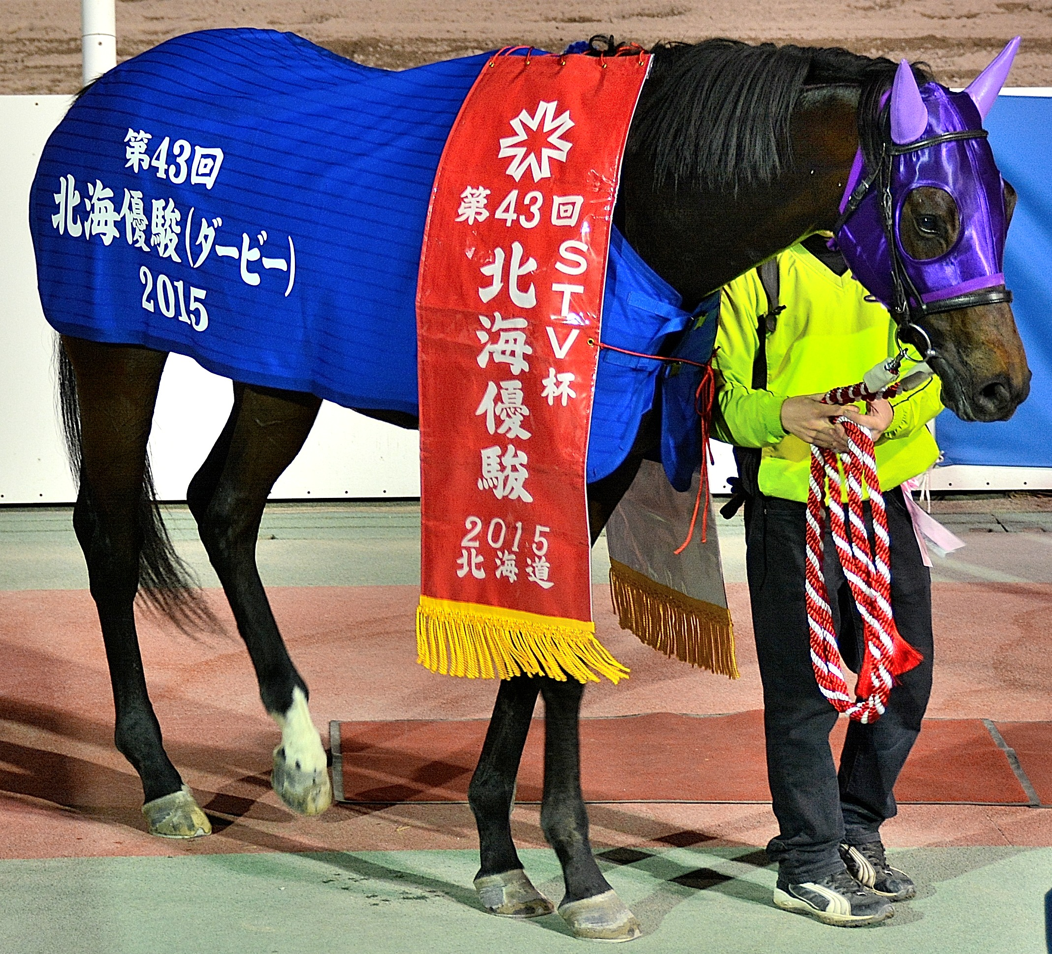 2015年6月2日に門別競馬場で行われた「第43回北海優駿」にて、勝利馬フジノサムライが競走後の表彰式で優勝レイ（赤色）と馬着（青色）を着装しているところを、観客席から撮影。